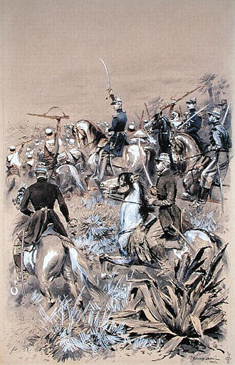 "Le duc d'Aumale attaque la Smalah à Taguin le 16 mai 1843", dessin d'Edouard Detaille offert au Duc d'Aumale en 1887.